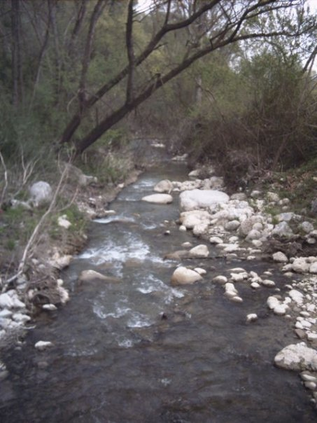 Torrente Schiavone Civitella Casanova